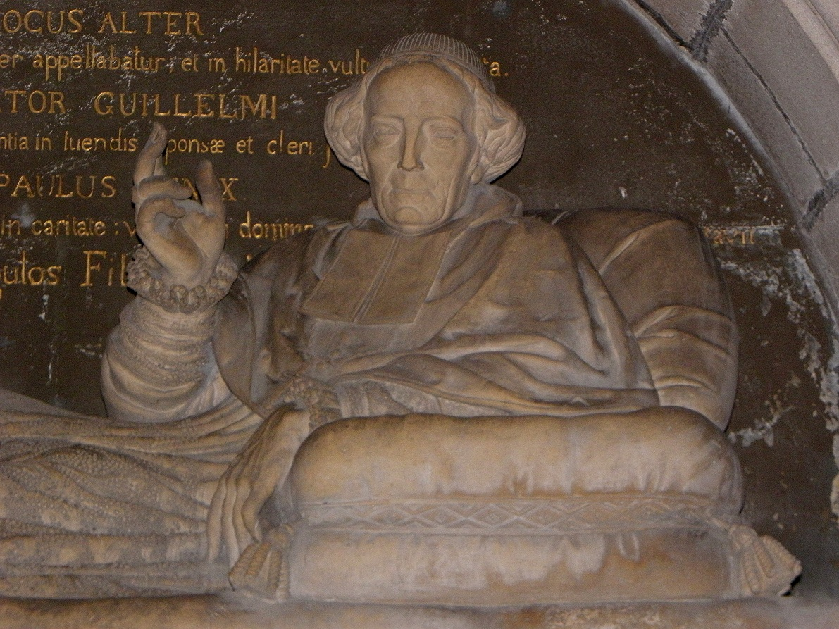 Détail du tombeau de Mgr Mathias Le Groing de La Romagère, évêque de Saint-Brieuc et Tréguier (1817-1841), en la cathédrale Saint-Étienne de Saint-Brieuc (22).